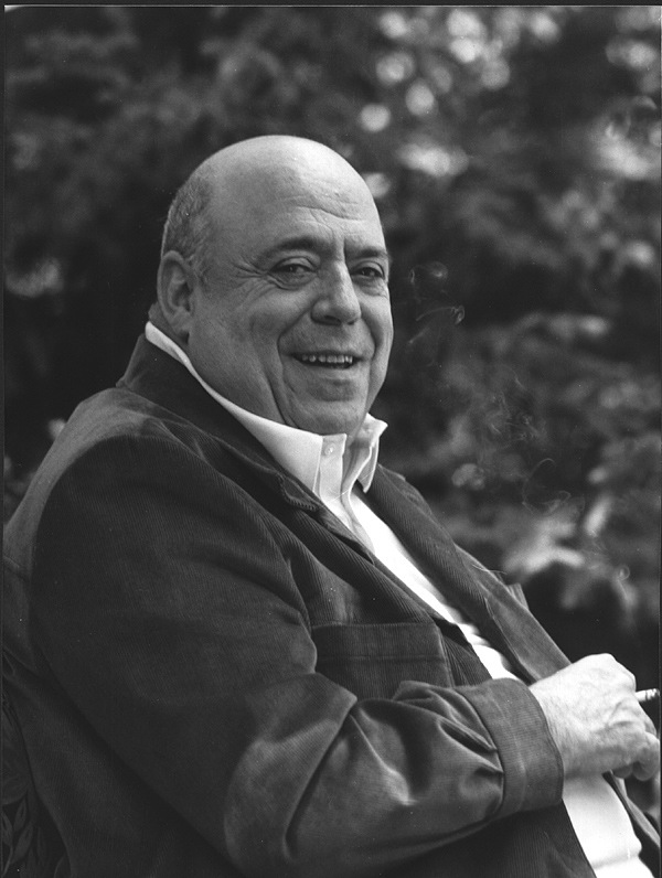 Dr. Silvio Fanti portrait